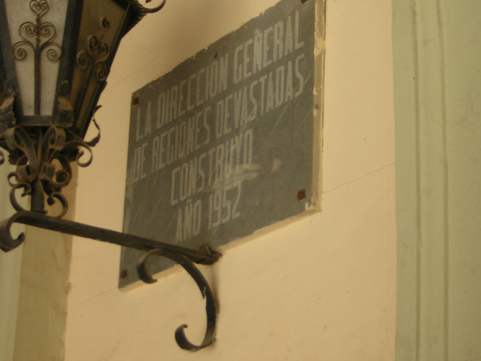 Placa indicando la reconstrucción de la Plaza de los Corregidores, en Guadix, tras la Guerra Civil española.